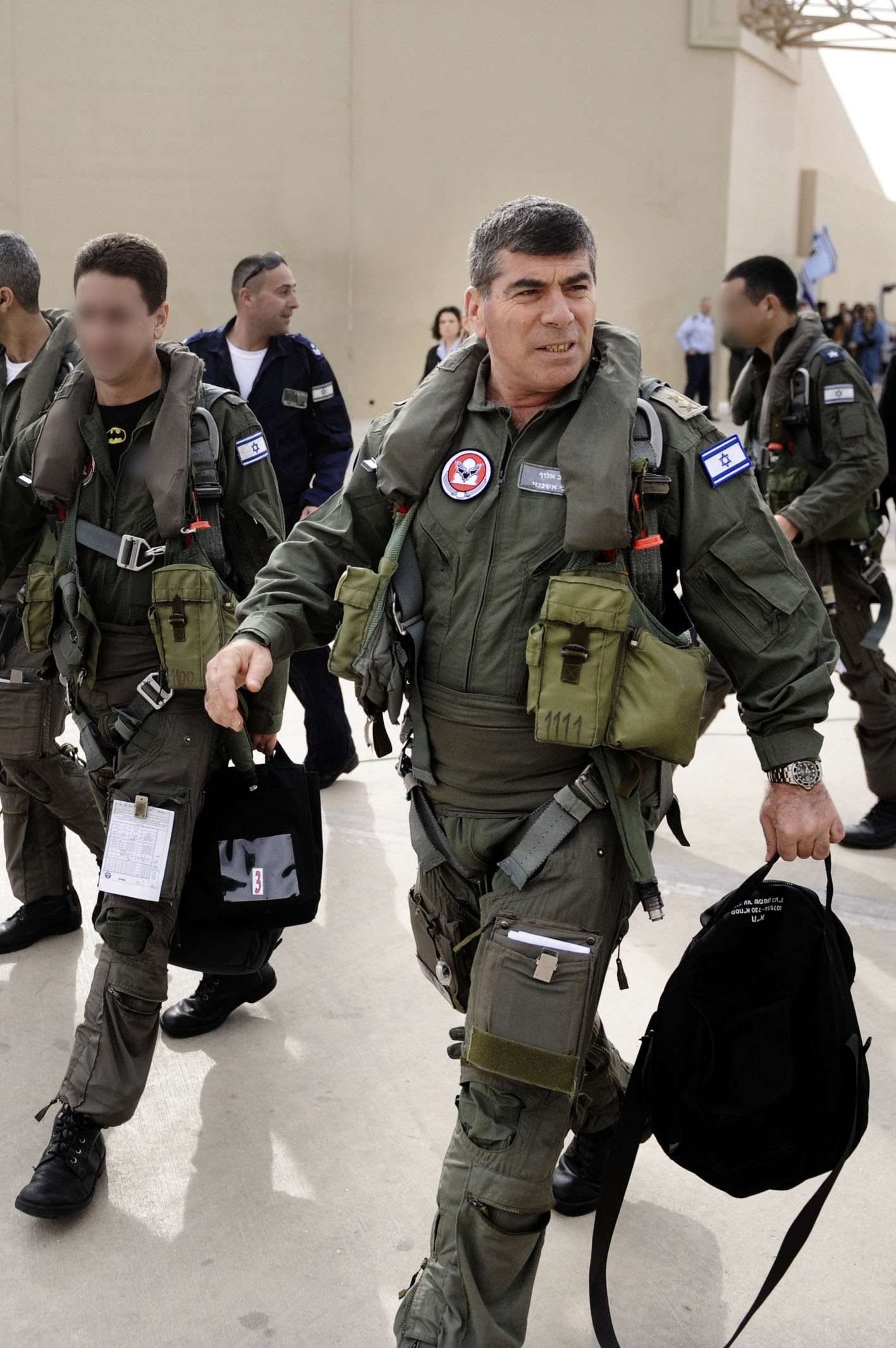 January 18, 2011. The Chief of the General Staff, Lt. Gen. Gabi Ashkenazi, visits the Air Force as part of his final meeting with all units and branches in the IDF. During his visit, Lt. Gen. Ashkenazi came to the Ramon and Nevatim IAF bases, met with bereaved families who had lost loves ones during service, flew in th F-16I ("Sufa") plane, and took part in advanced training in a C-130 Hercules ("Karnaf") plane. במסגרת סבב ביקורי הפרידה של הרמטכ"ל, רב אלוף גבי אשכנזי, מיחידות צה"ל התקיים היום (ג'), ביקור פרידה מחיל האוויר. במהלך הביקור ביקר בבסיסי חיל האוויר רמון ונבטים, נפגש עם משפחות שכולות, טס במטוס "סופה" וביצע תרגיל מתקדם במטוס "קרנף".